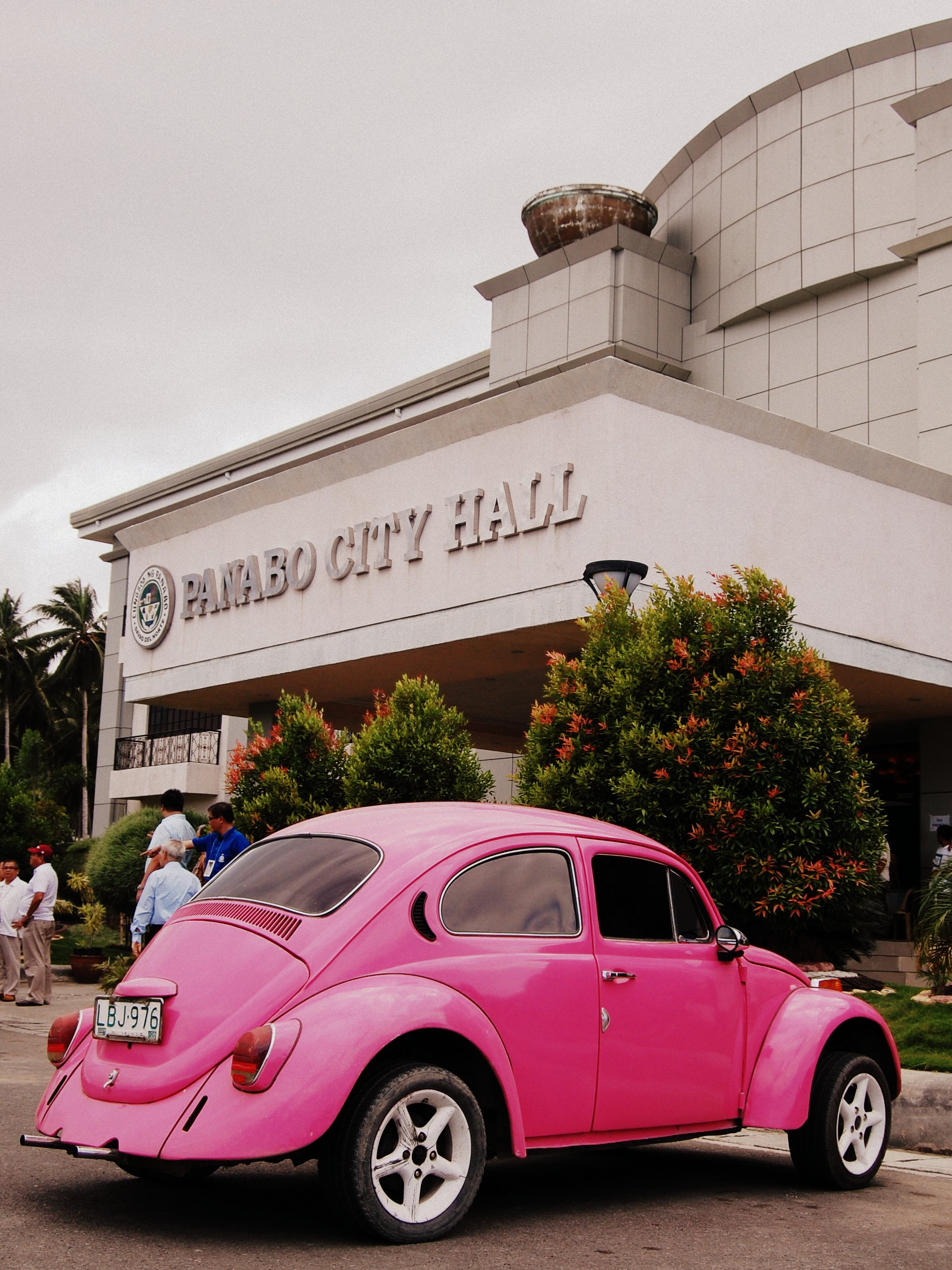 Panabo City Hall, Davao Oriental, Philippines